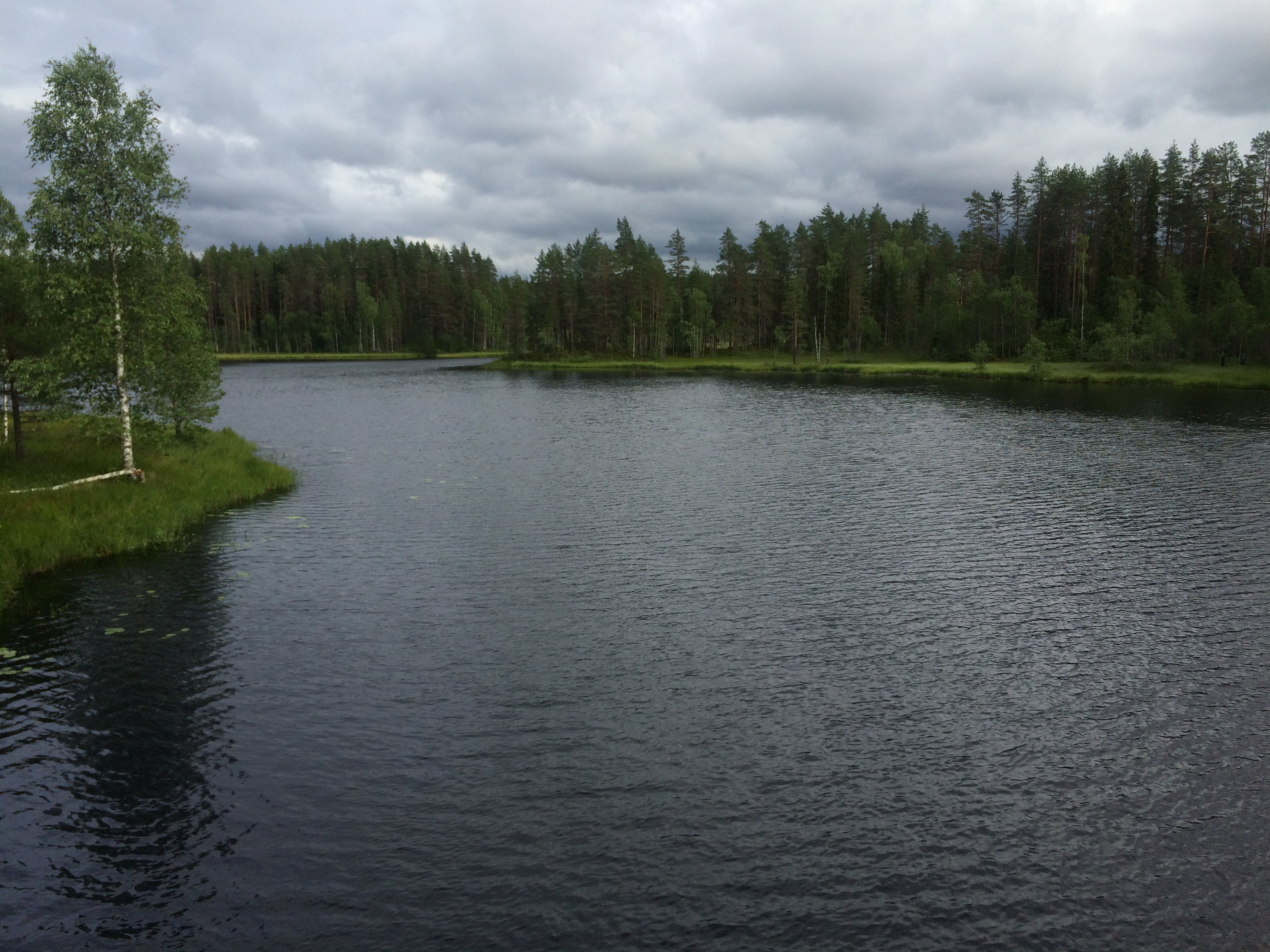 Сютивиермянйоки